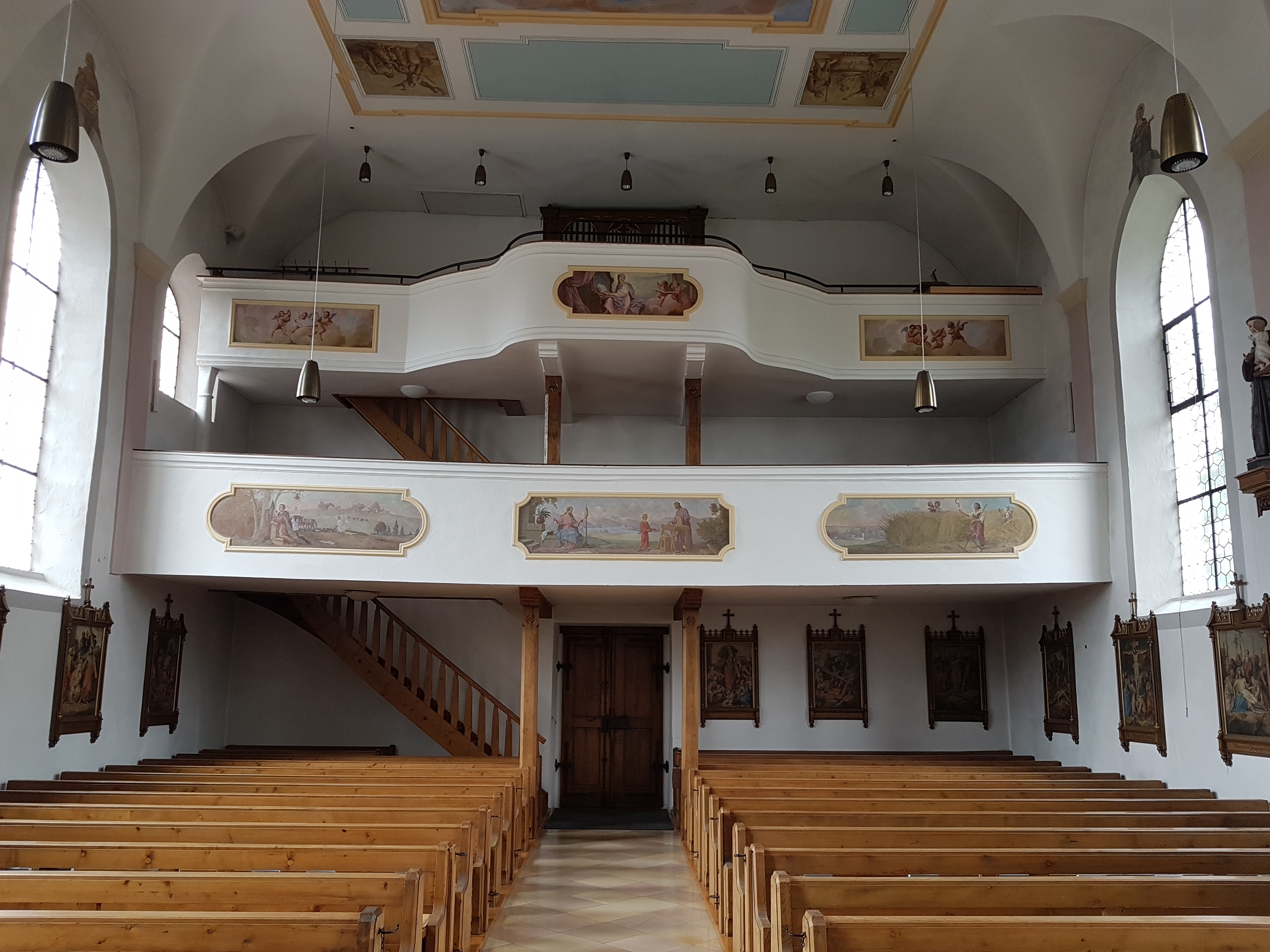 Rettenbach am Auerberg, Pfarrkirche St. Vitus